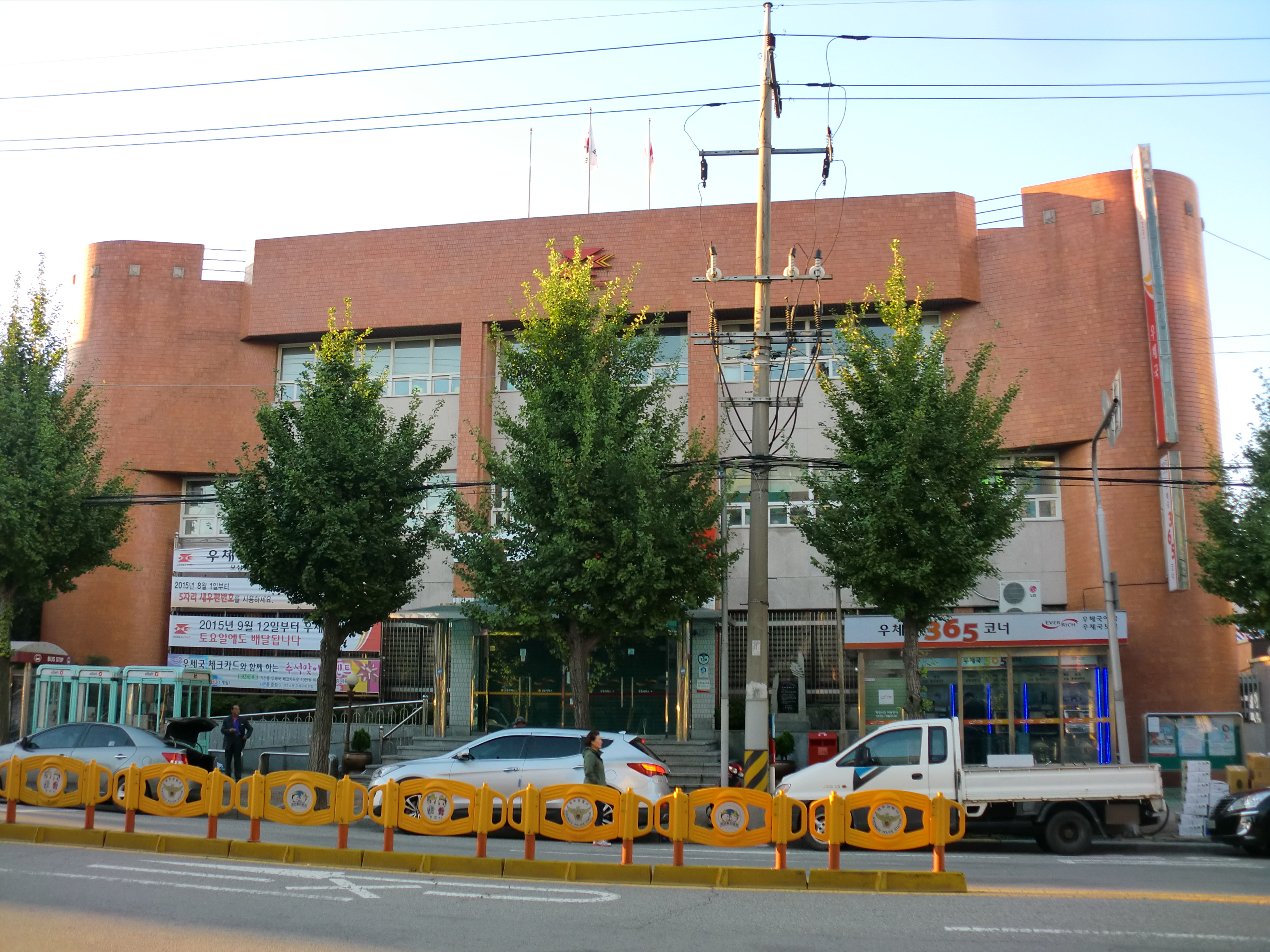 경상북도 경주시에 있는 경주우체국